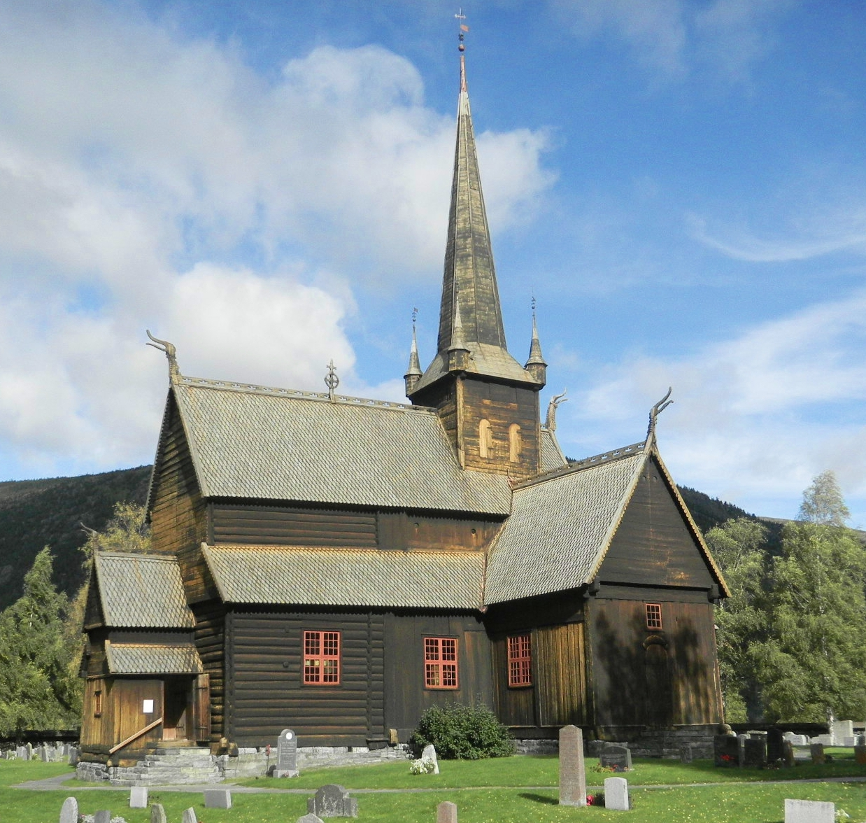 Iglesia en Noruega